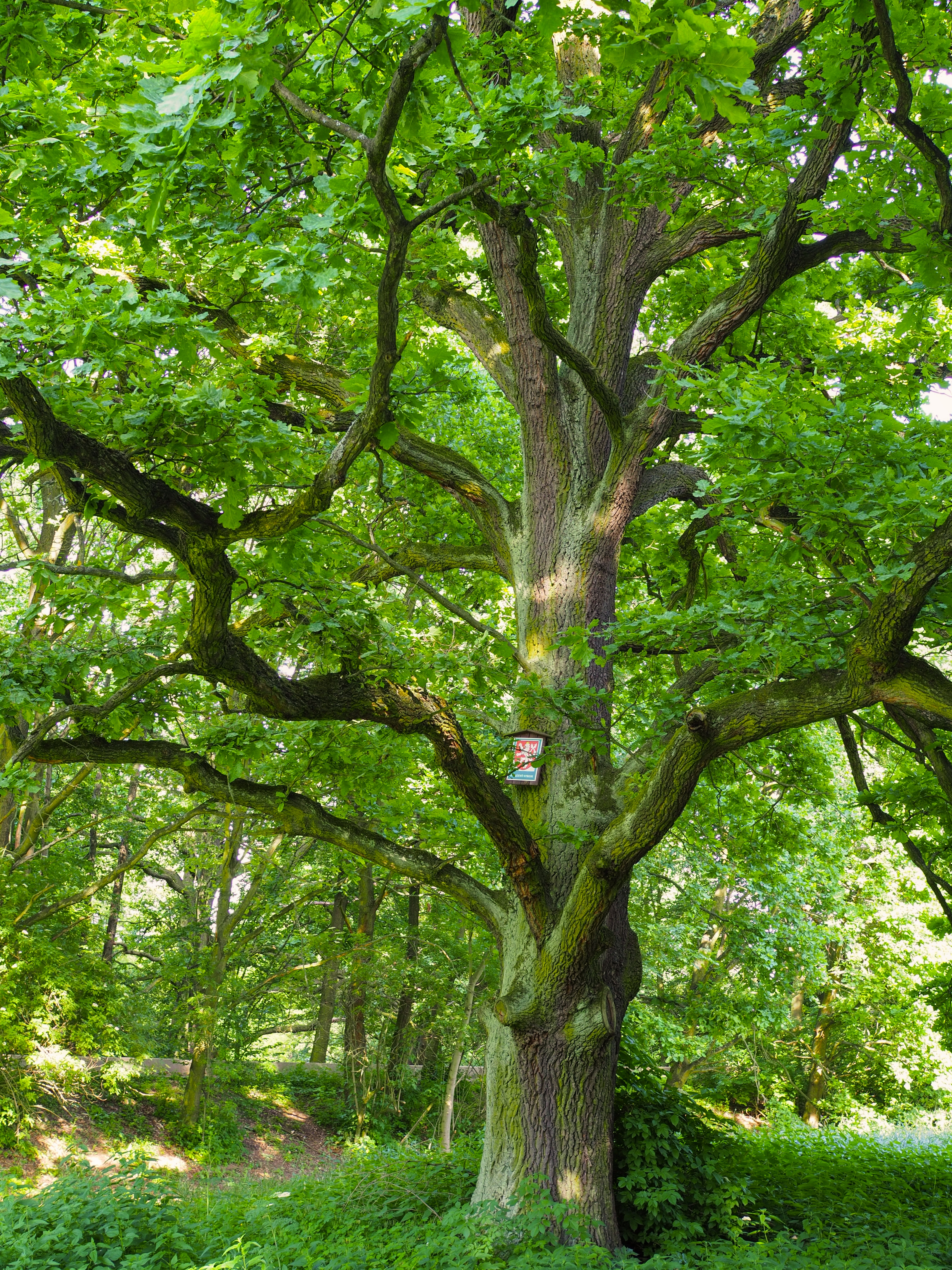 Památný strom Dub letní u loděnice v Malšovicích (Famous tree Dub letní u loděnice v Malšovicích)